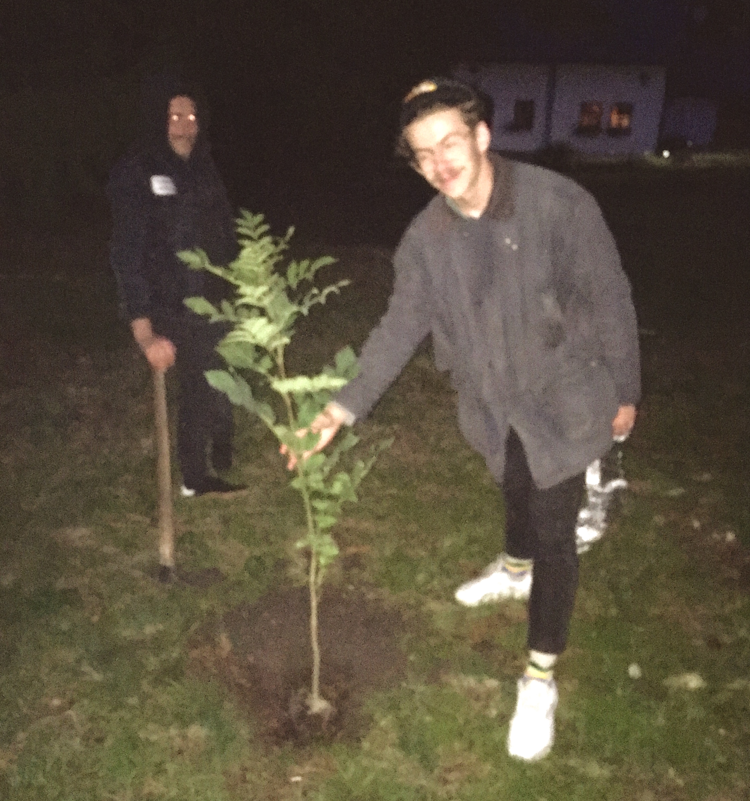 sázení stromu s duchem